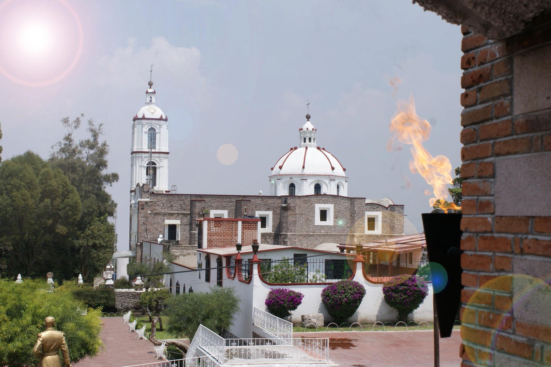 Parroquia de San Francisco de Asís